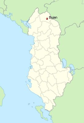 Srpskohrvatski / српскохрватски: Mjesto Bujan u Albaniji